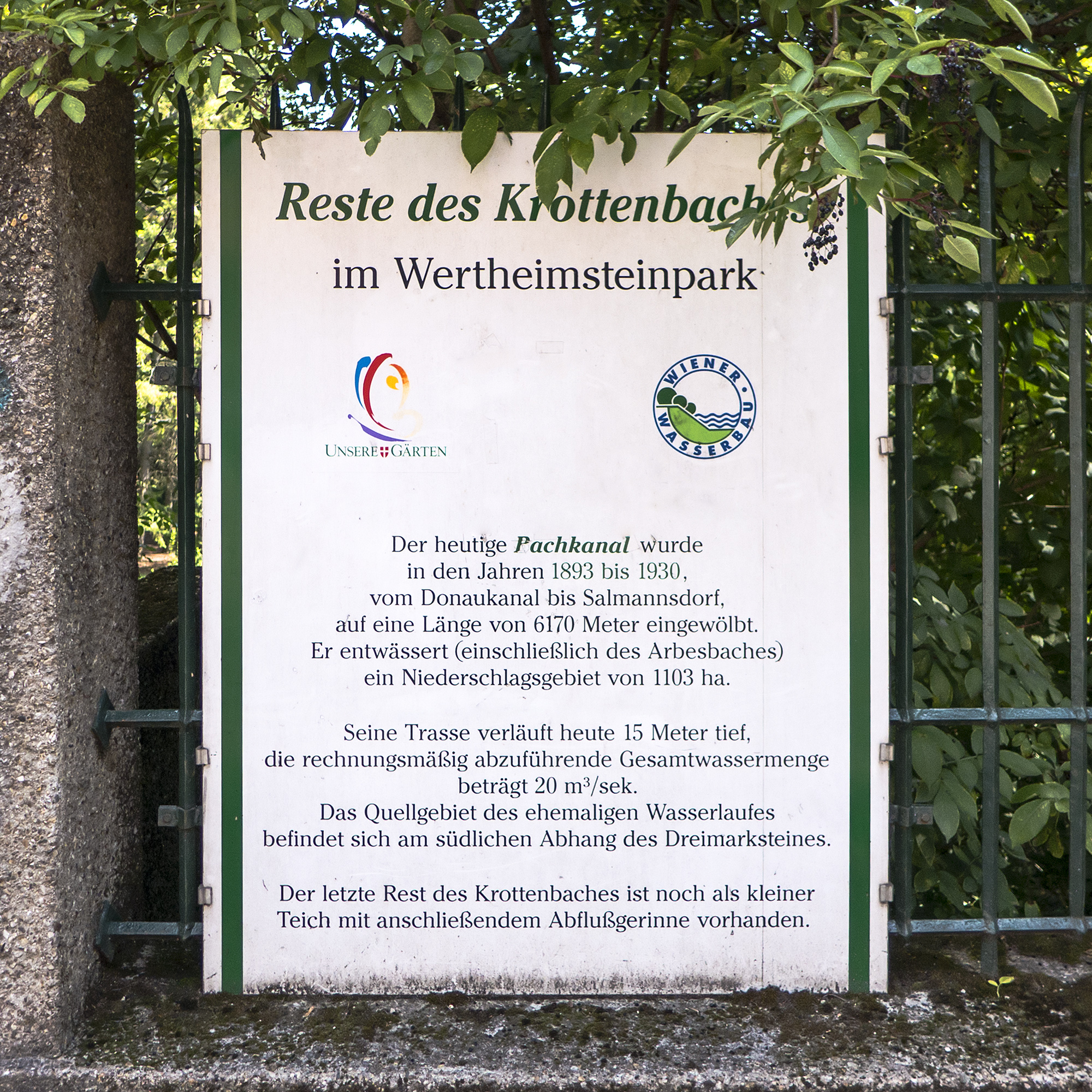 Wertheimsteinpark in Wien 19